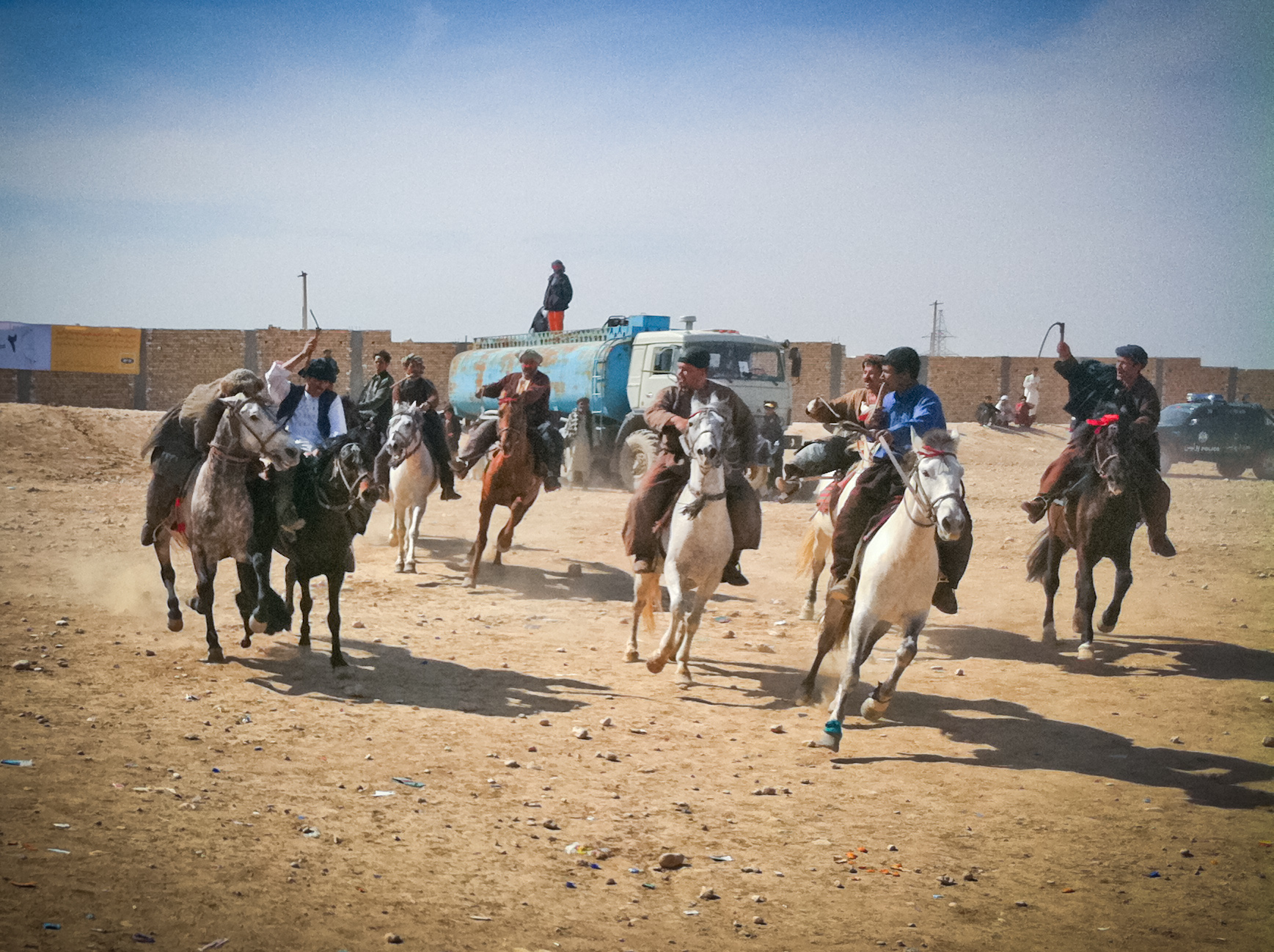 Nowruz Buzkashi Match in Mazar